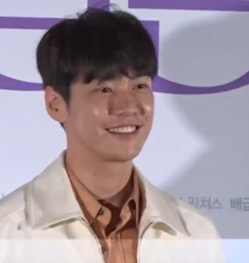 디스패치 구독 클릭! Dispatch Subscribe